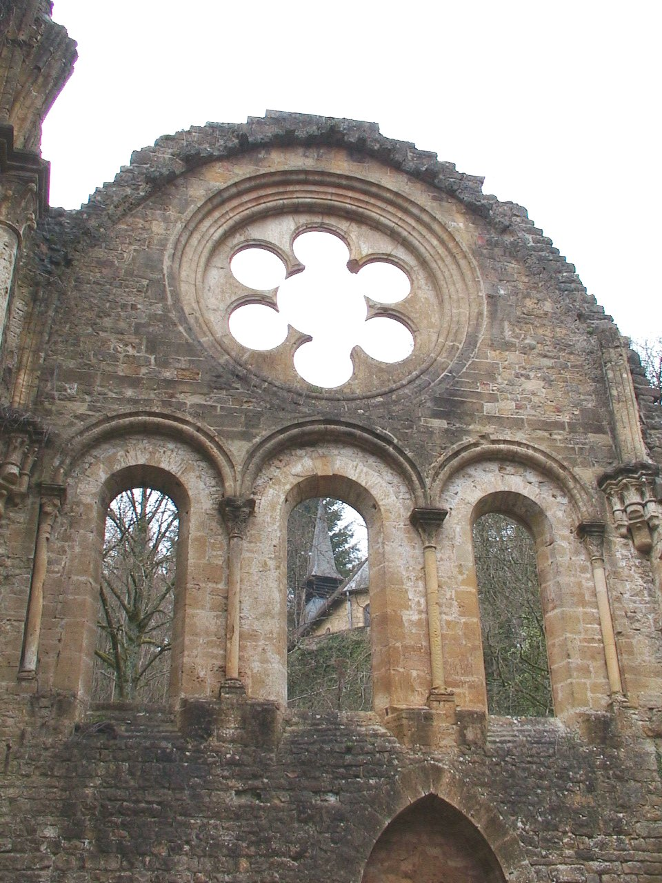 Les ruines de l'ancienne abbaye d'Orval (Belgique) : rosace.